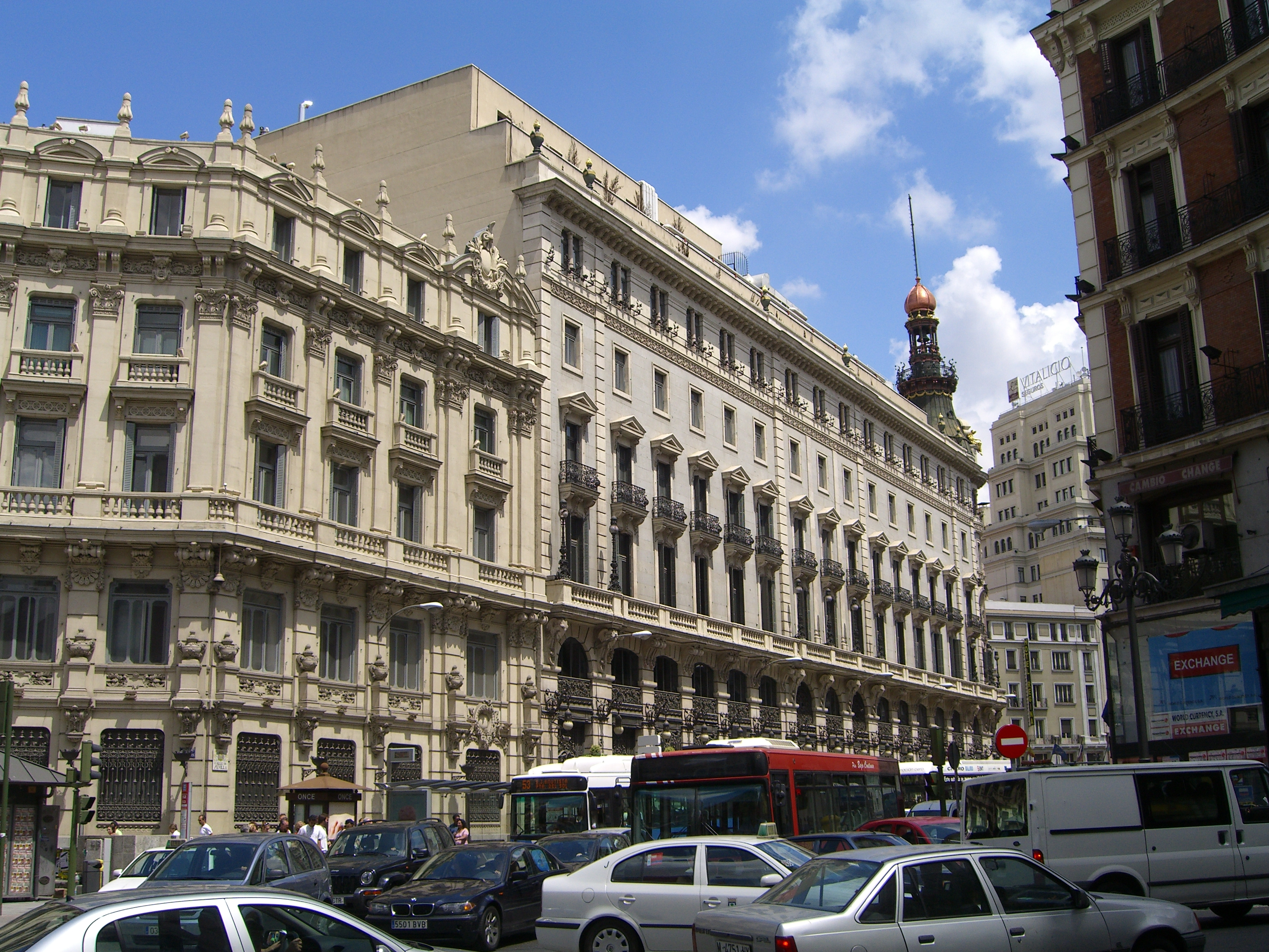 Calle Sevilla desde la plaza de Canalejas